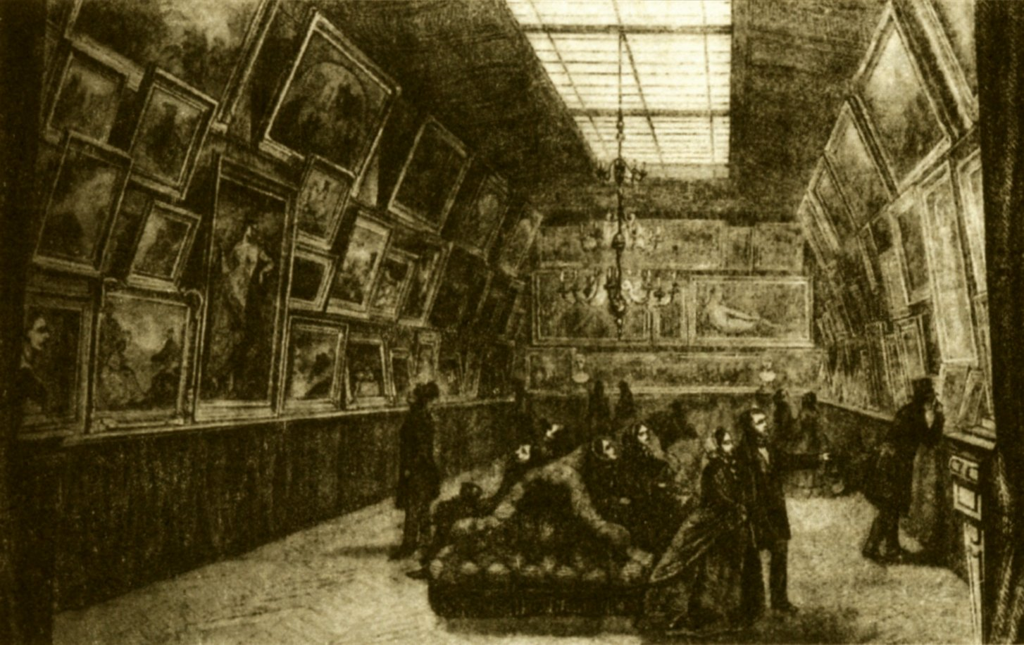 Rytina zachycující původní Goupilovu galerii v rue Chaptal